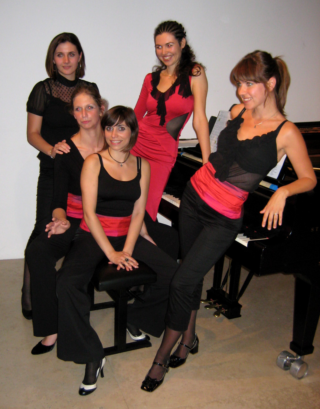 Las Felinas del Tango, quartett performing tango music